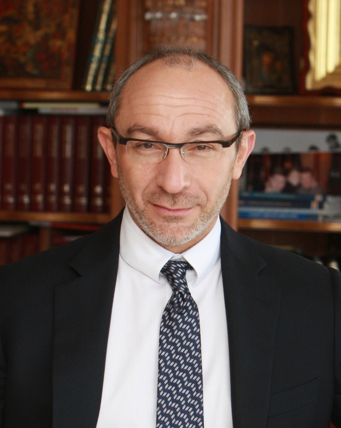 Портрет Геннадия Кернеса